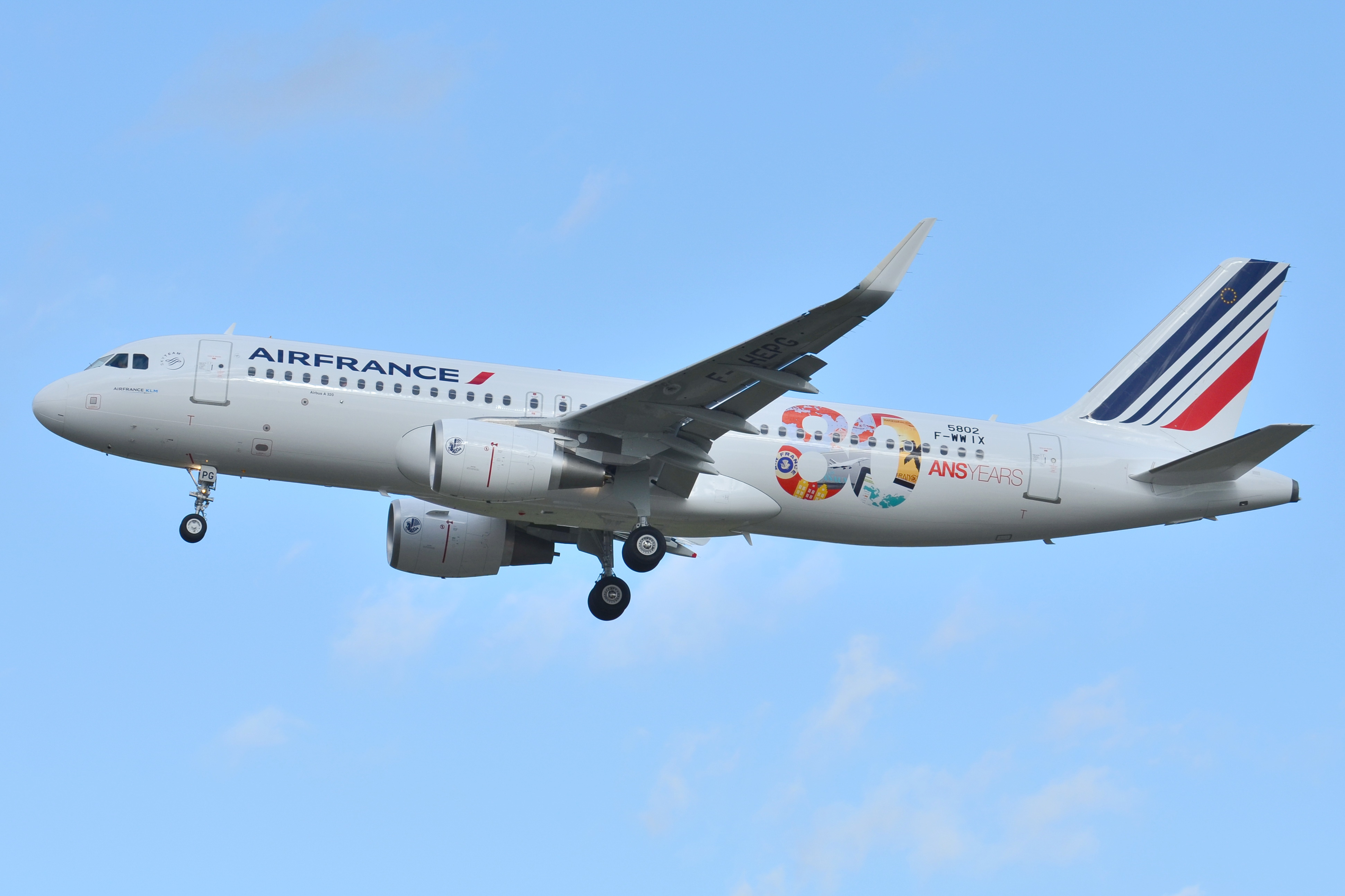 Photo prise à l'aéroport de Toulouse-Blagnac (LFBO) en France. Picture take at Toulouse-Blagnac Airport (LFBO) in France.